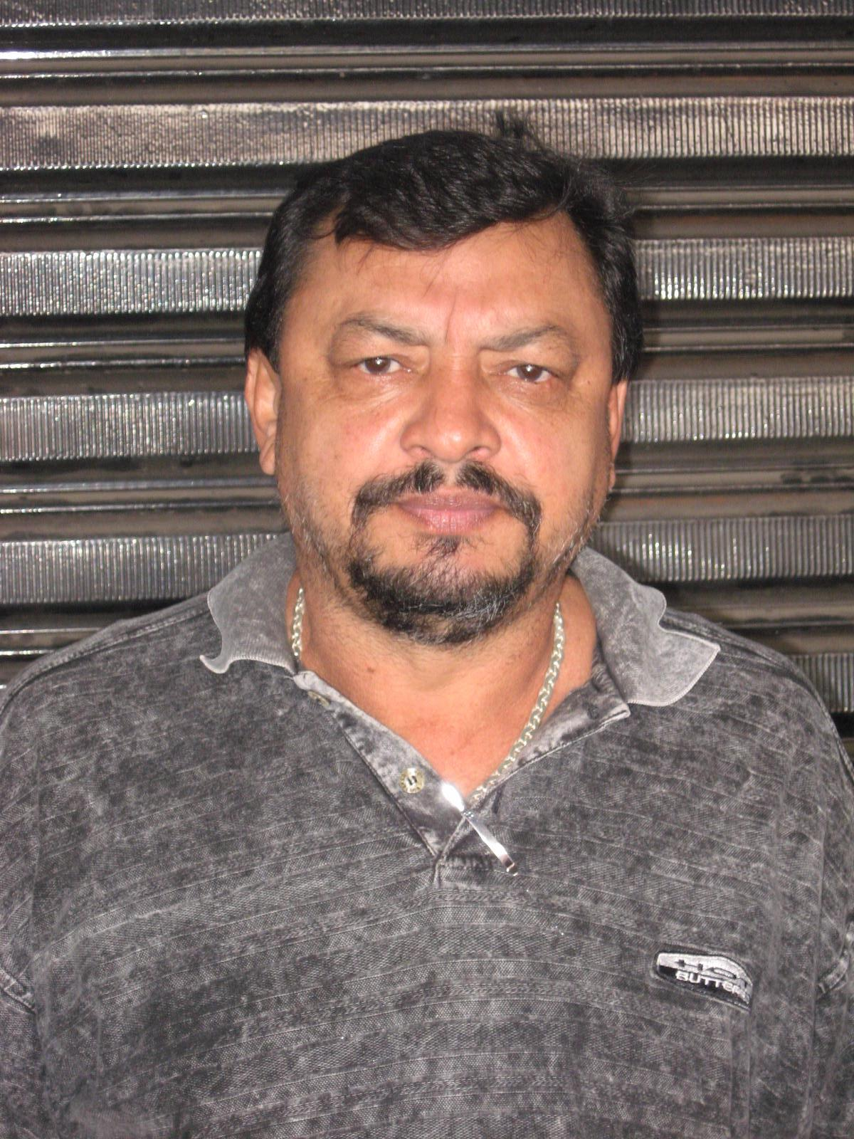 Ademar Barbosa, presidente do Esporte Clube Anchieta.